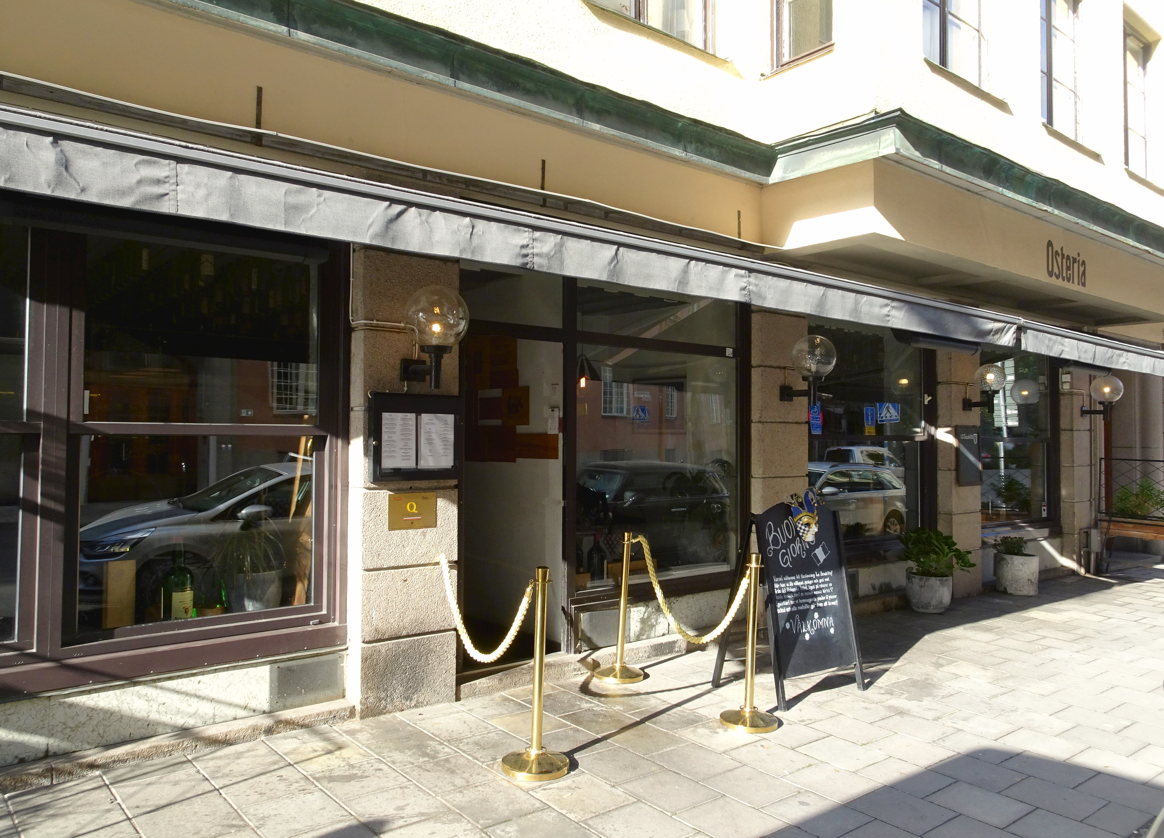 Före detta Östergök, nuvarande Lo Scudetto